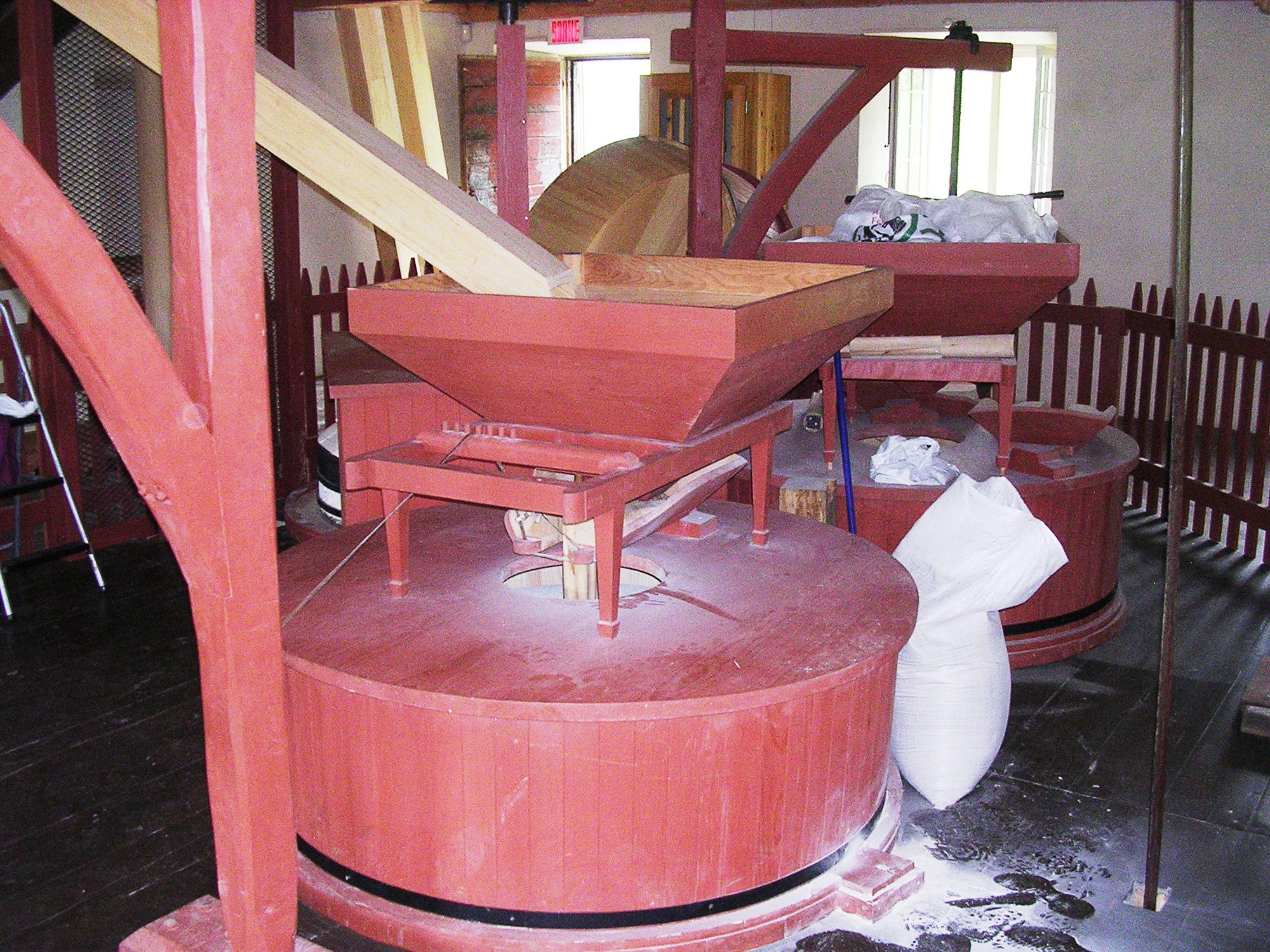 L'une des deux moulanges du moulin de la Rémy à Baie-Saint-Paul (Québec); moulin à eau; moulin à farine; meules.